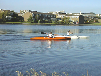 Killingworth lake, T&W, UK.